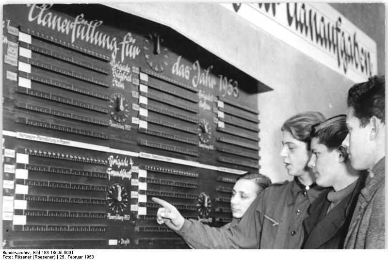 Magdeburg, Metallarbeiter vor einer Leistungstafel Zentralbild Rösener 25.2.1953 Zur Frühjahrsbestellung 1953 Auf der Maschinen-Traktoren-Station Magdeburg-Süd wurden zur reibungslosen Durchführung der Frühjahrsbestellung gute Vorbereitungen getroffen. UBz: Jugendliche der "Dewa"-Schraubenfabrik, besichtigen bei einem Besuch die Anzeigetafeln der Planerfüllung.